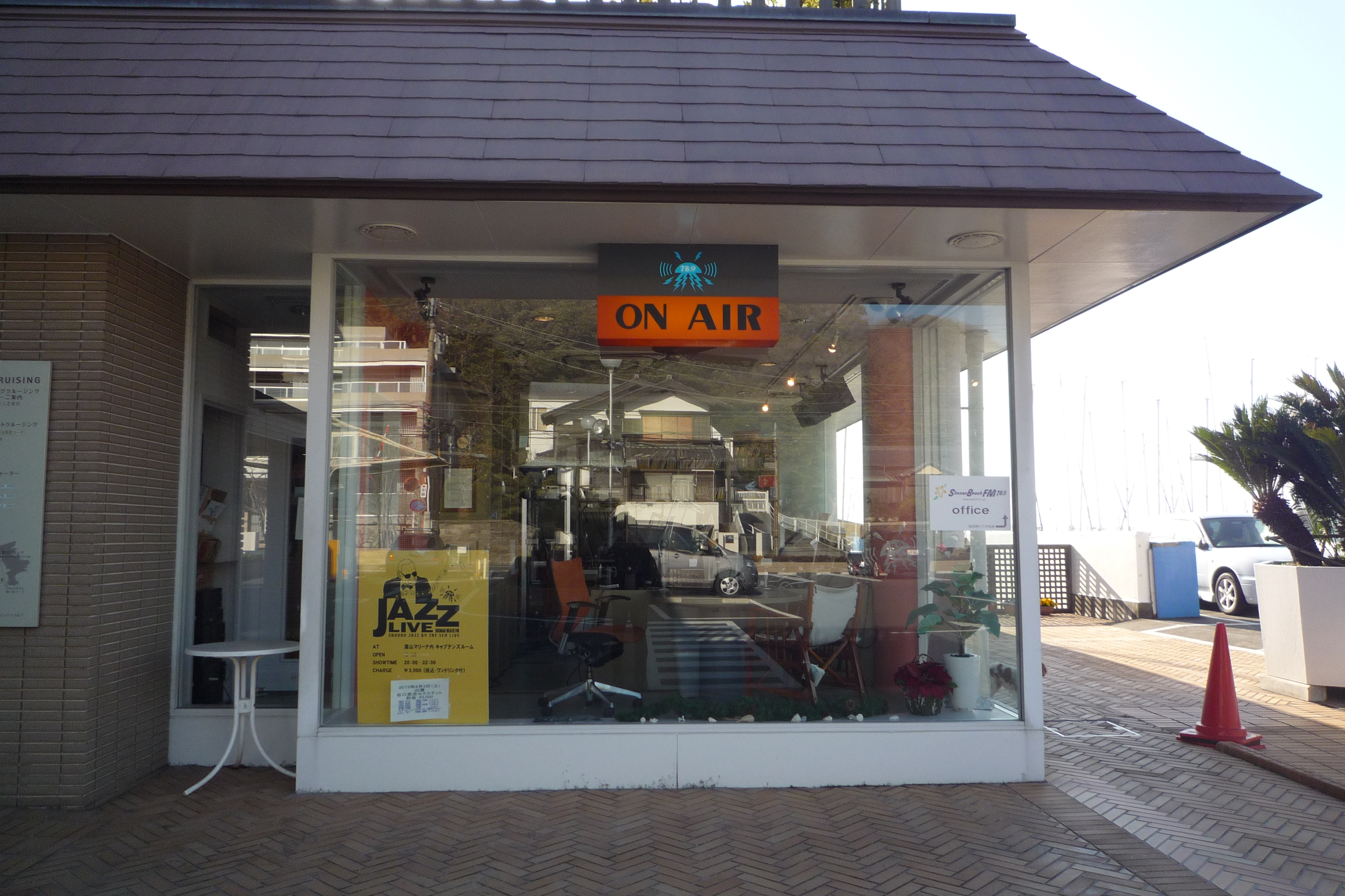 逗子・葉山コミュニティ放送の画像